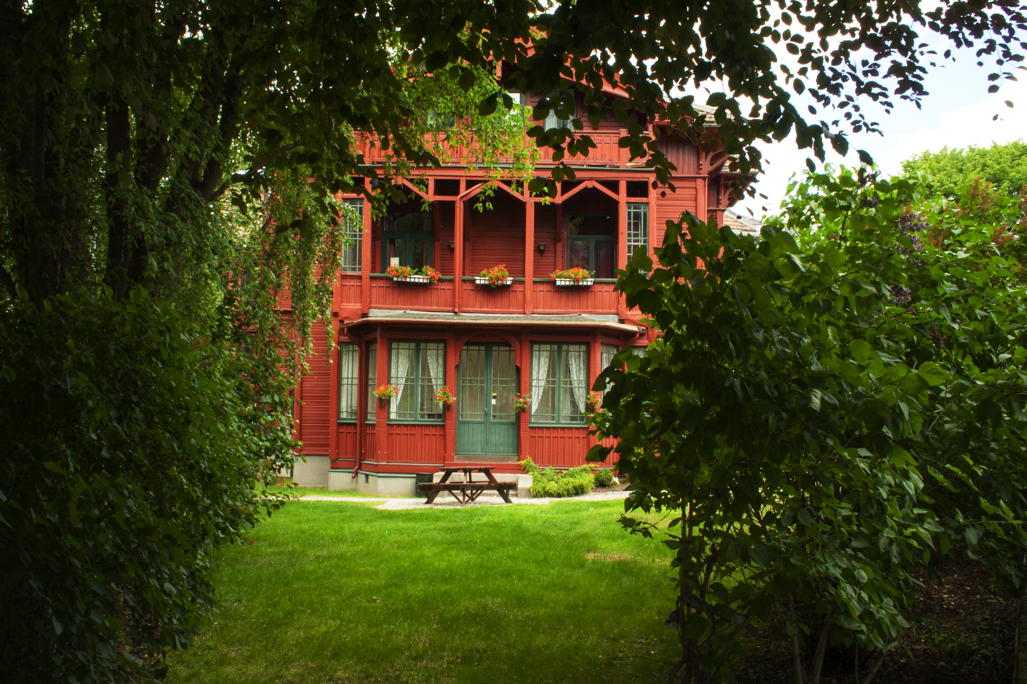 Barratt Due musikkinstitutt ligger i Lyder Sagens gt 2 i Oslo